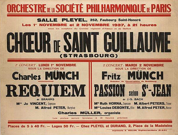 Chœur de l'Eglise Saint-Guillaume, Strasbourg. 1er Concert, lundi 1er novembre 1937 sous la dir. de Charles Munch, Requiem de Brahms... ; 2e concert, mardi 2 novembre 1937 sous la dir. de Fritz Munch, Passion selon St.-Jean de J.-S. Bach... Salle Pleyel... (Paris). Dir : Fritz Munch et Charles Munch.